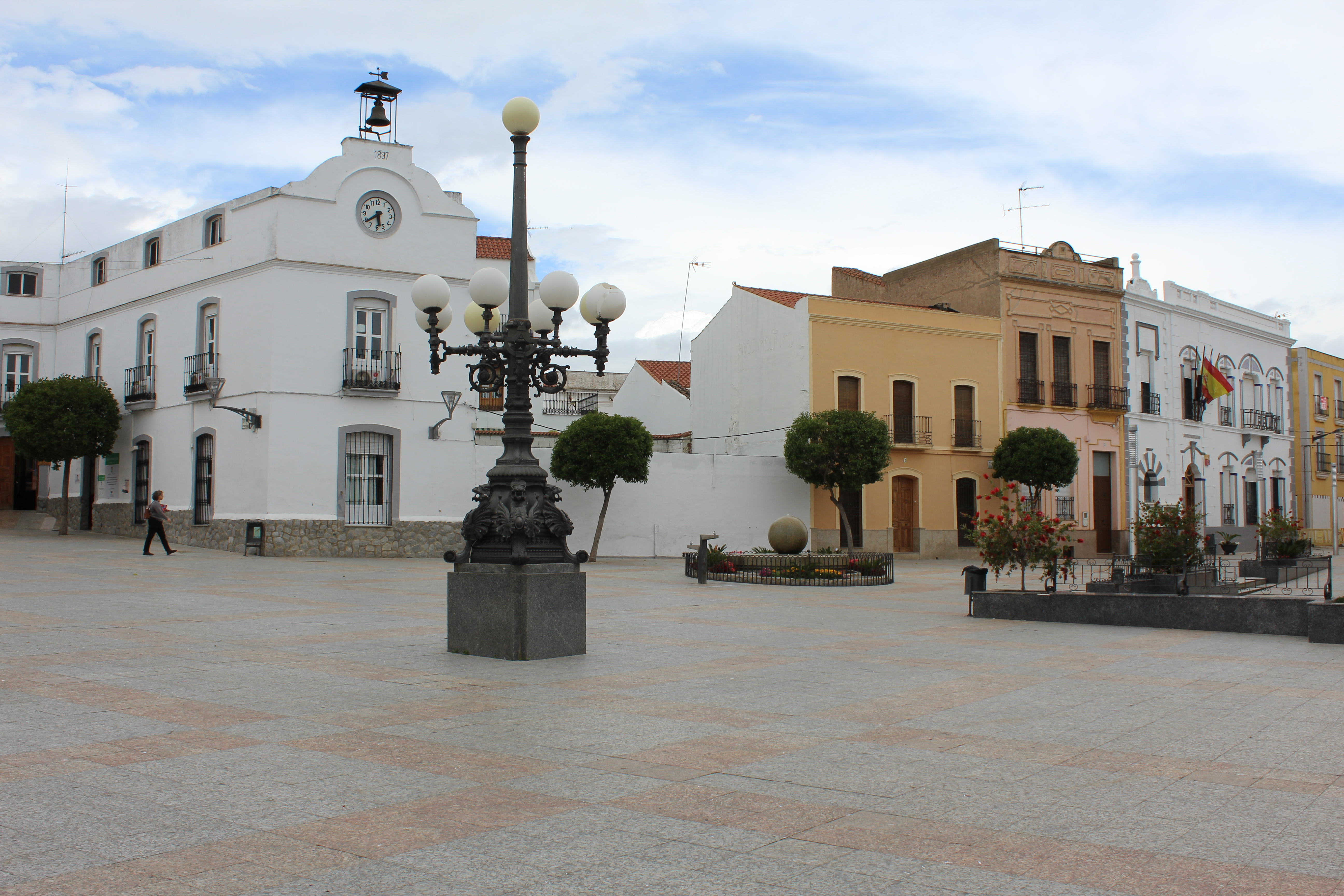 Ayuntamientos antiguo y nuevo